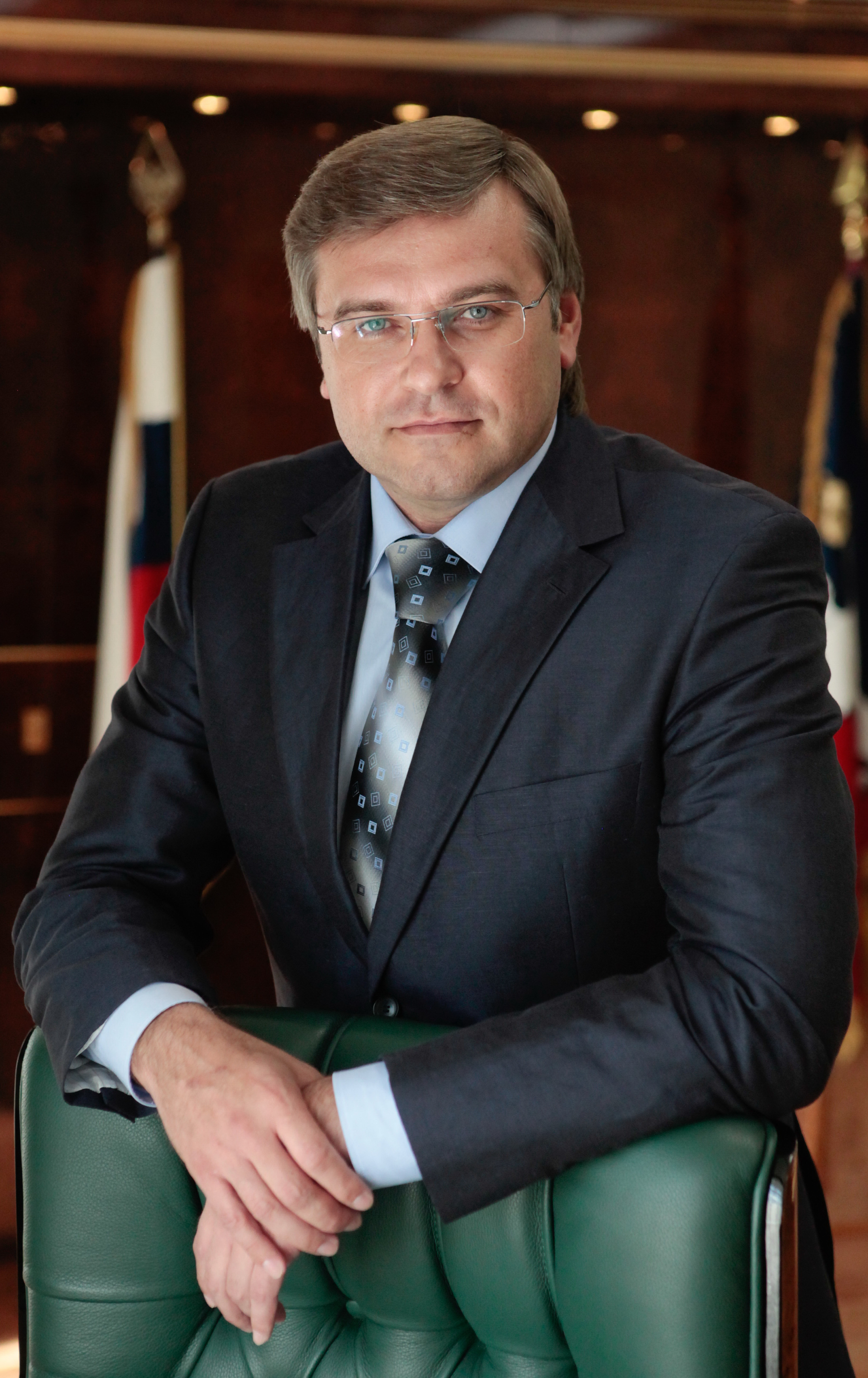 Олег Курилов